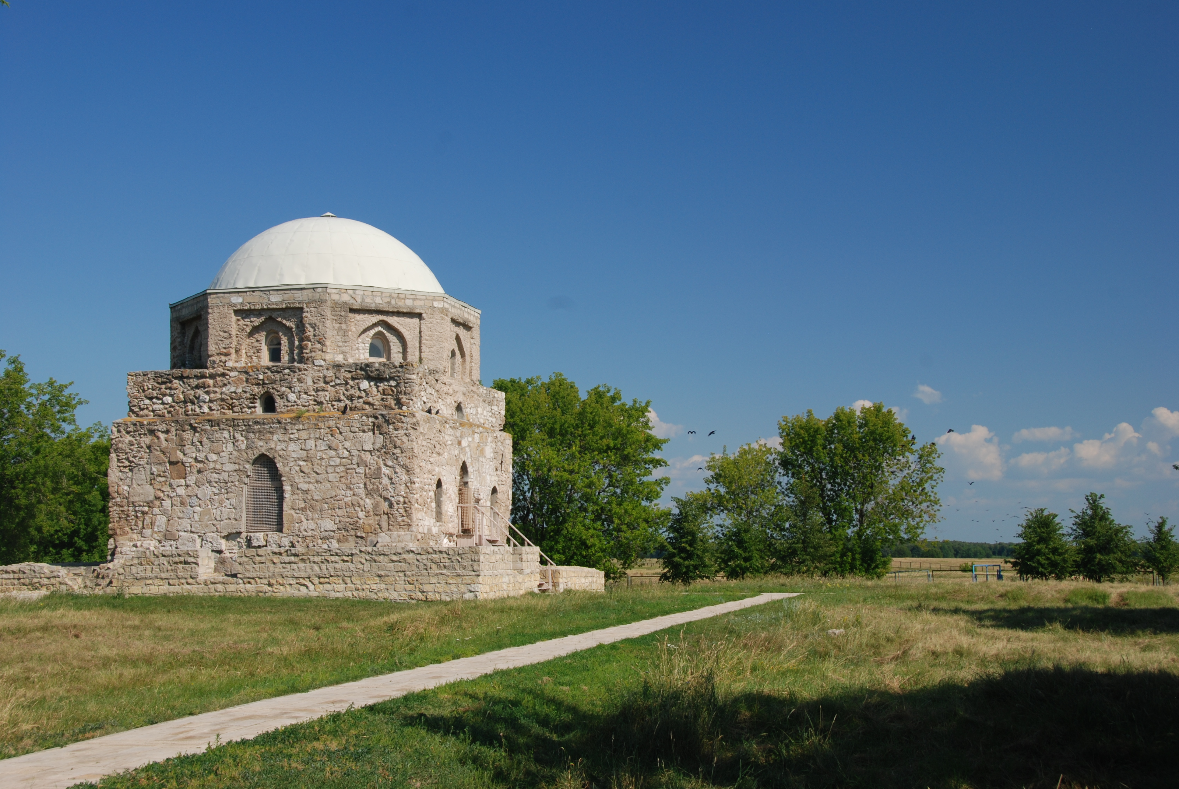 Комплекс памятников архитектуры XIII-XIV вв. на территории Булгарского городища (архитектурный комплекс «Болгары») (Республика Татарстан, Болгар, село Болгары, городище)